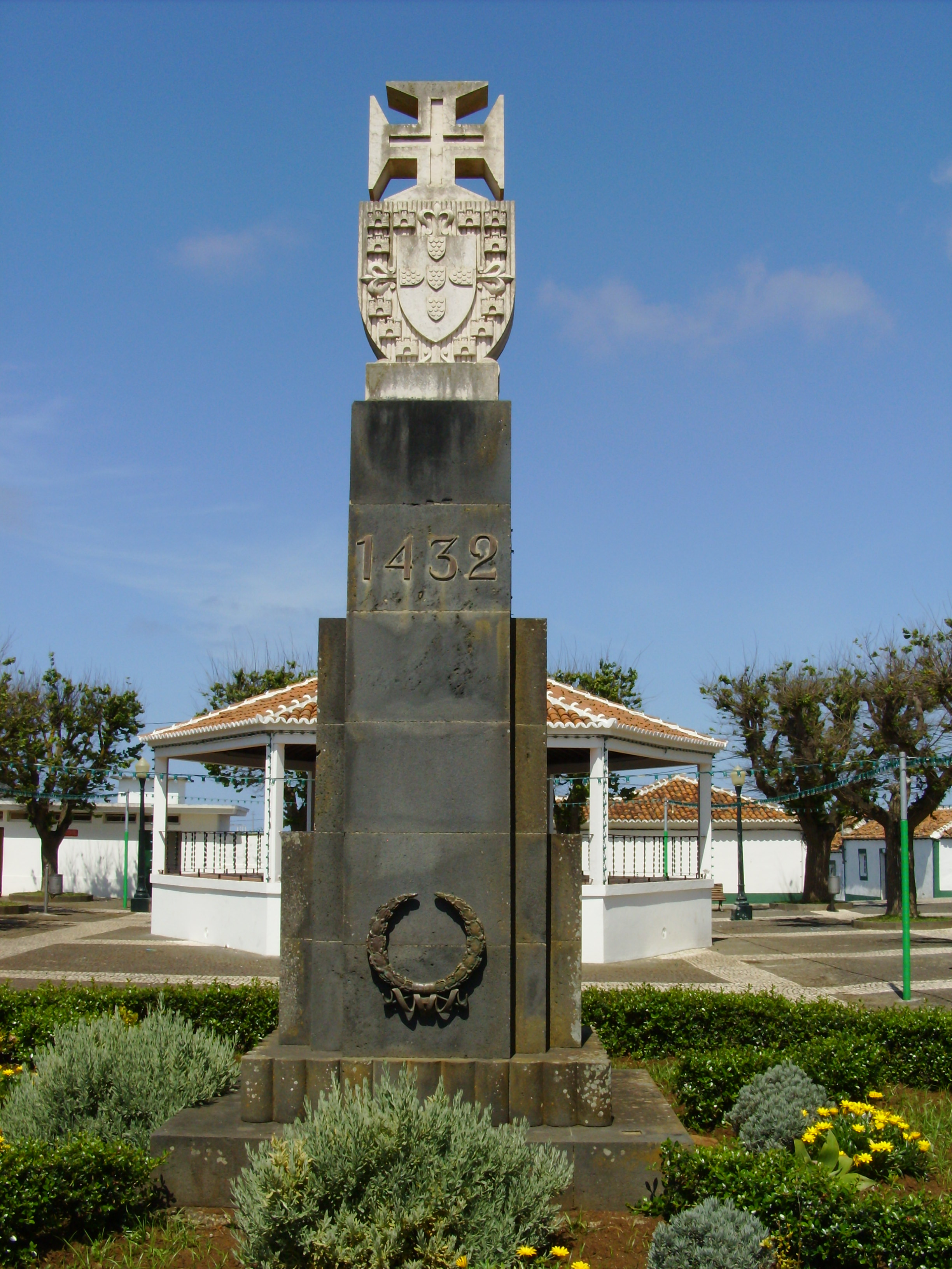 Monumento comemorativo do Descobrimento da Ilha de Santa Maria, Vila do Porto, ilha de Santa Maria, Açores, de autoria de António Alcântara de Mendonça Dias.